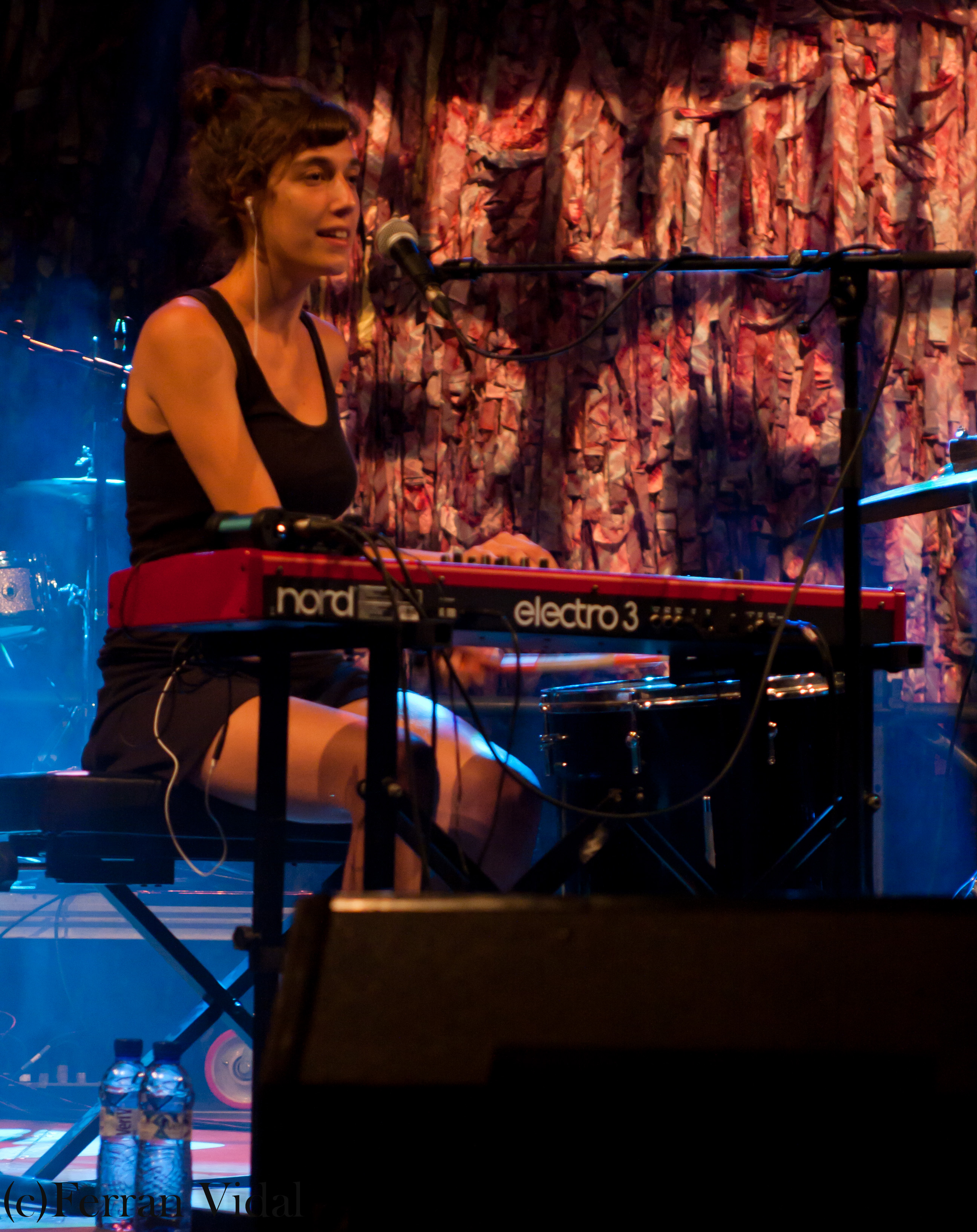 Concert Pau Vallvé, 8 de juliol de 2011, Festival Cruïlla Barcelona, Parc del Fòrum. Maria Coma.